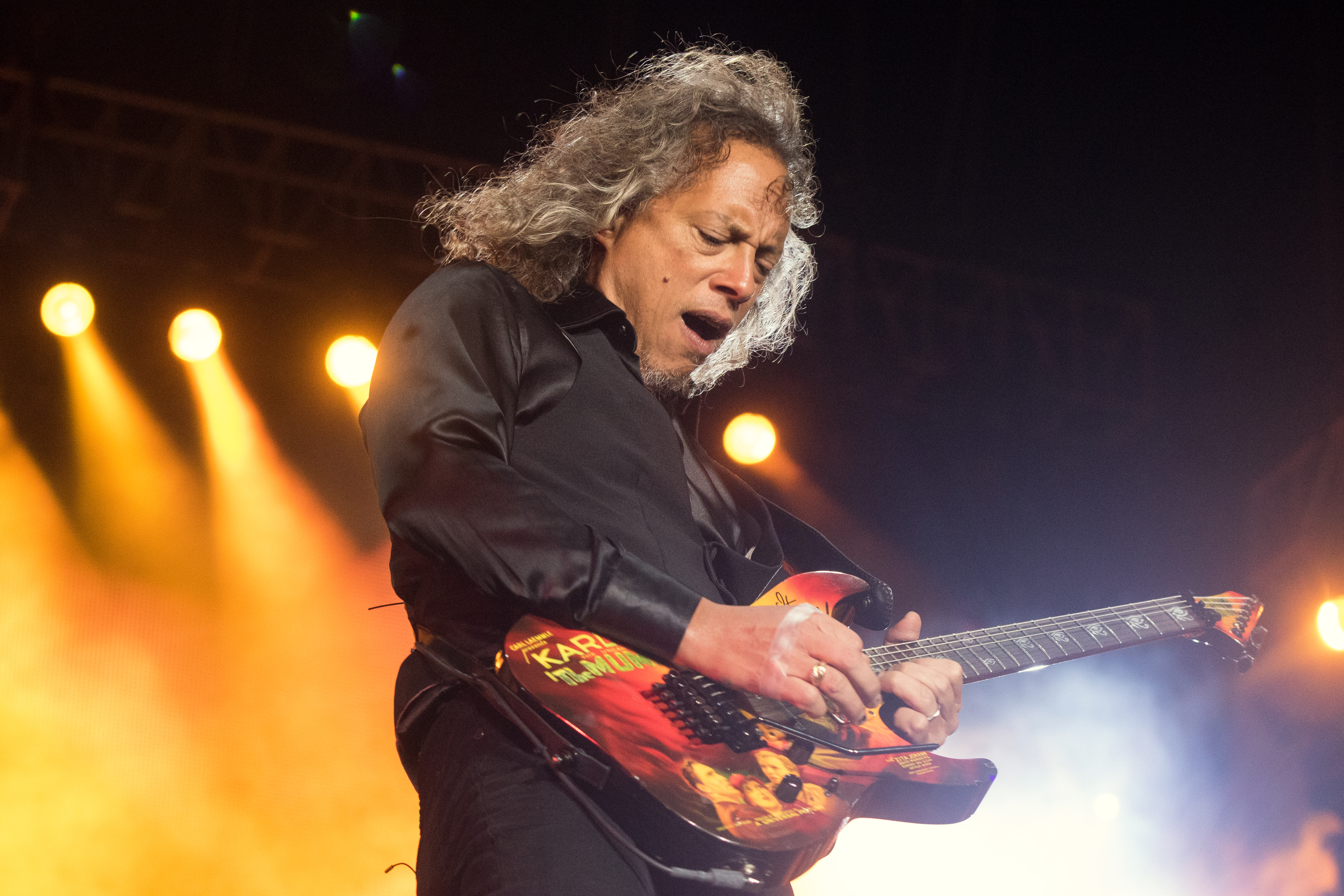 Kirk Hammett. Metallica. 2016